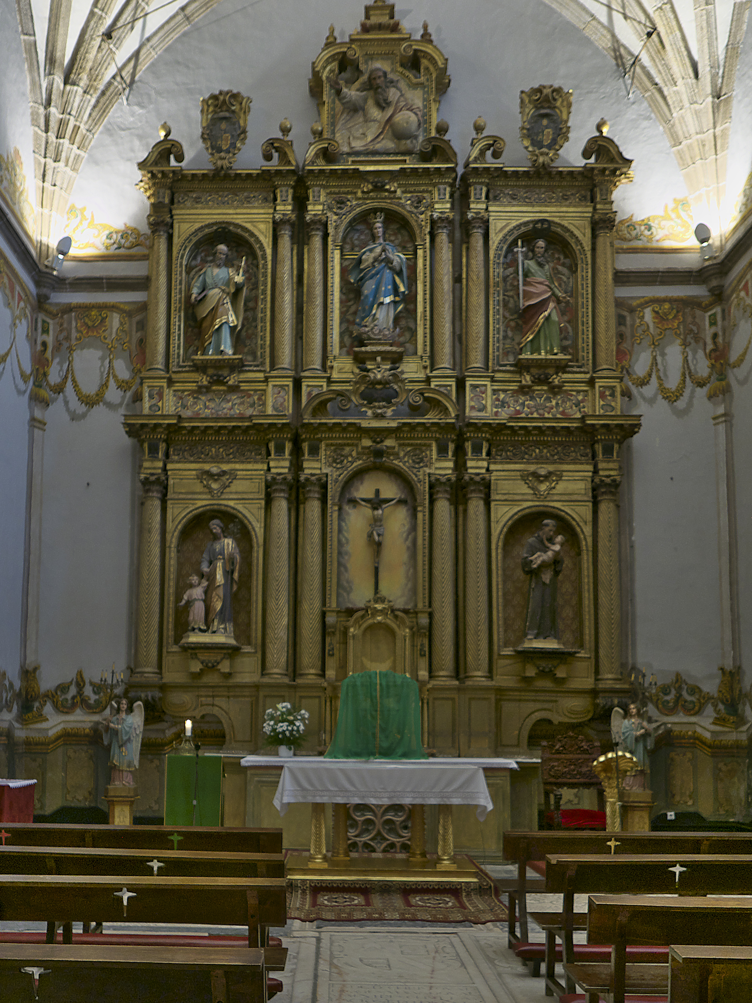 Capilla construída por Gaspar Méndez (1545). El retablo es de Blas de Escobar (1666), contratado por el obispo Jerónimo Rodríguez de Valderas, terminado en 1668, con dorado de Juan Piras y Cristóbal Rubio, para retablo mayor de la catedral. Trasladado desde la capilla mayor de la catedral (1726) con modificaciones a la actual capilla sacramental.